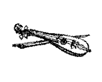 Rebec nach Michael Praetorius (1571–1621), deutscher Komponist und Organist